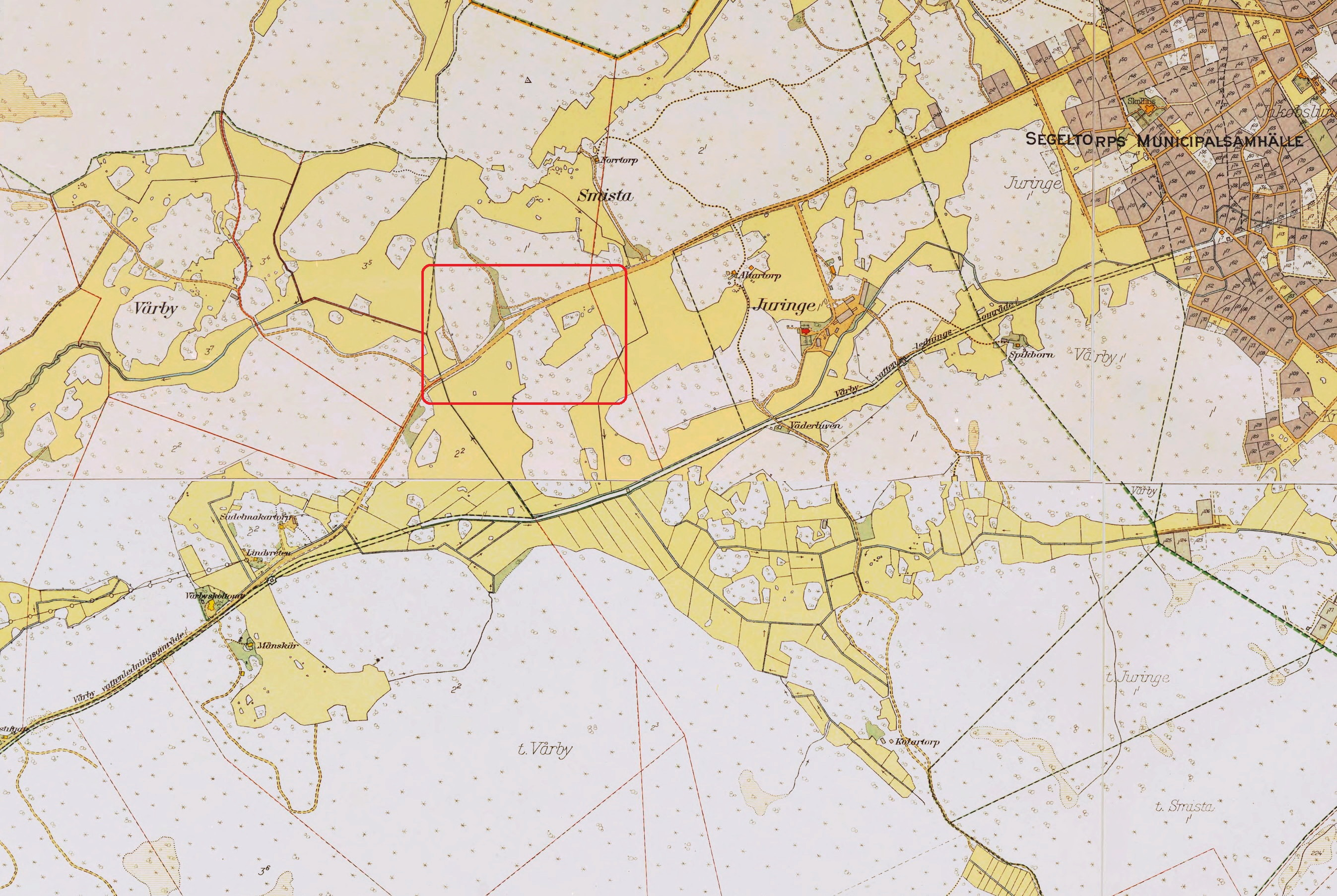 Kartblad ”Fridhem” ur Stockholms stad med omnejd i 12 blad. Plankartan är upprättad 1917-1924 av H. Hellberg och A. E. Påhlman. Tryckår 1924.